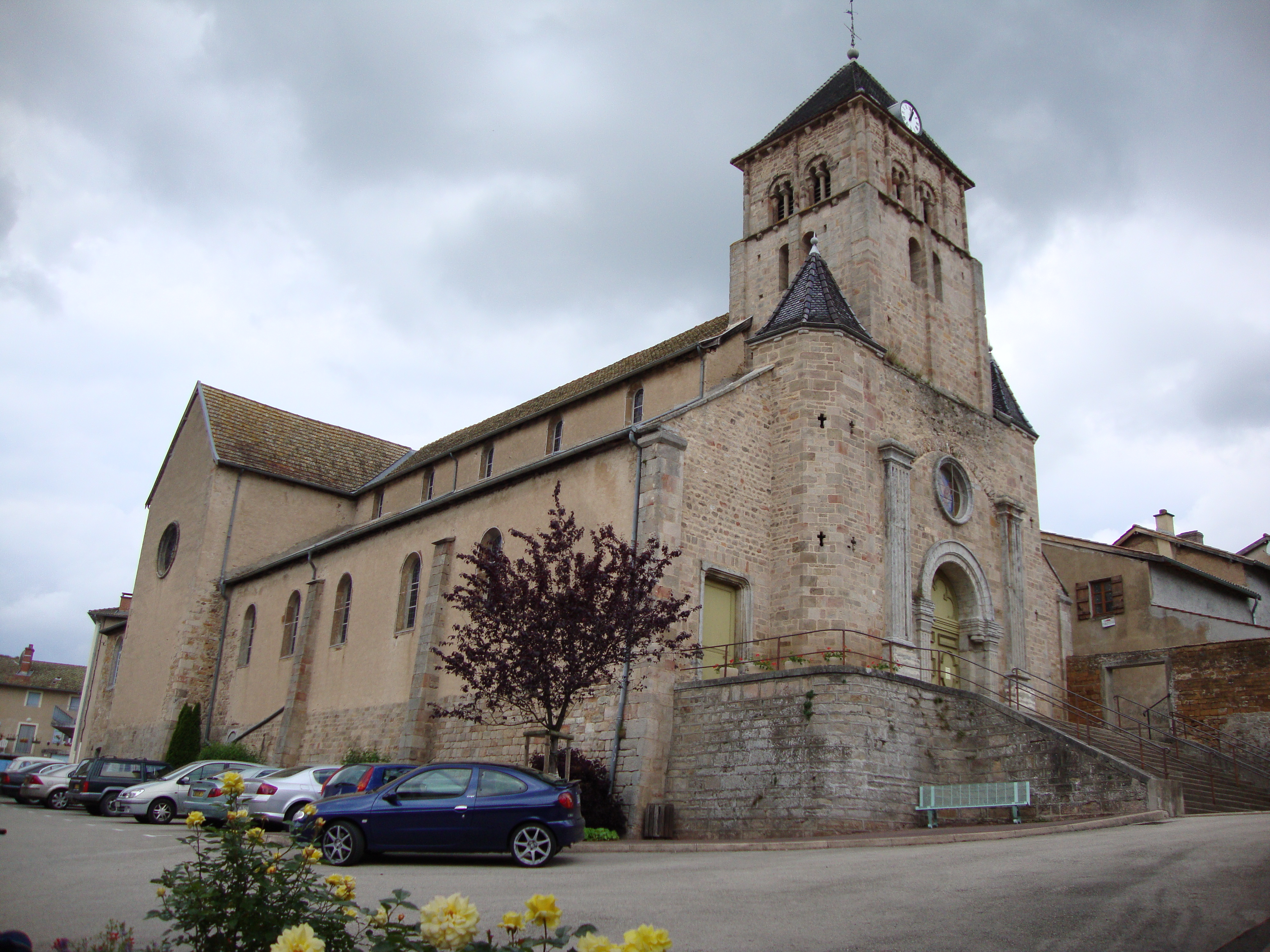 Tramayes(Saône-et-Loire, Fr) église avec escalier.